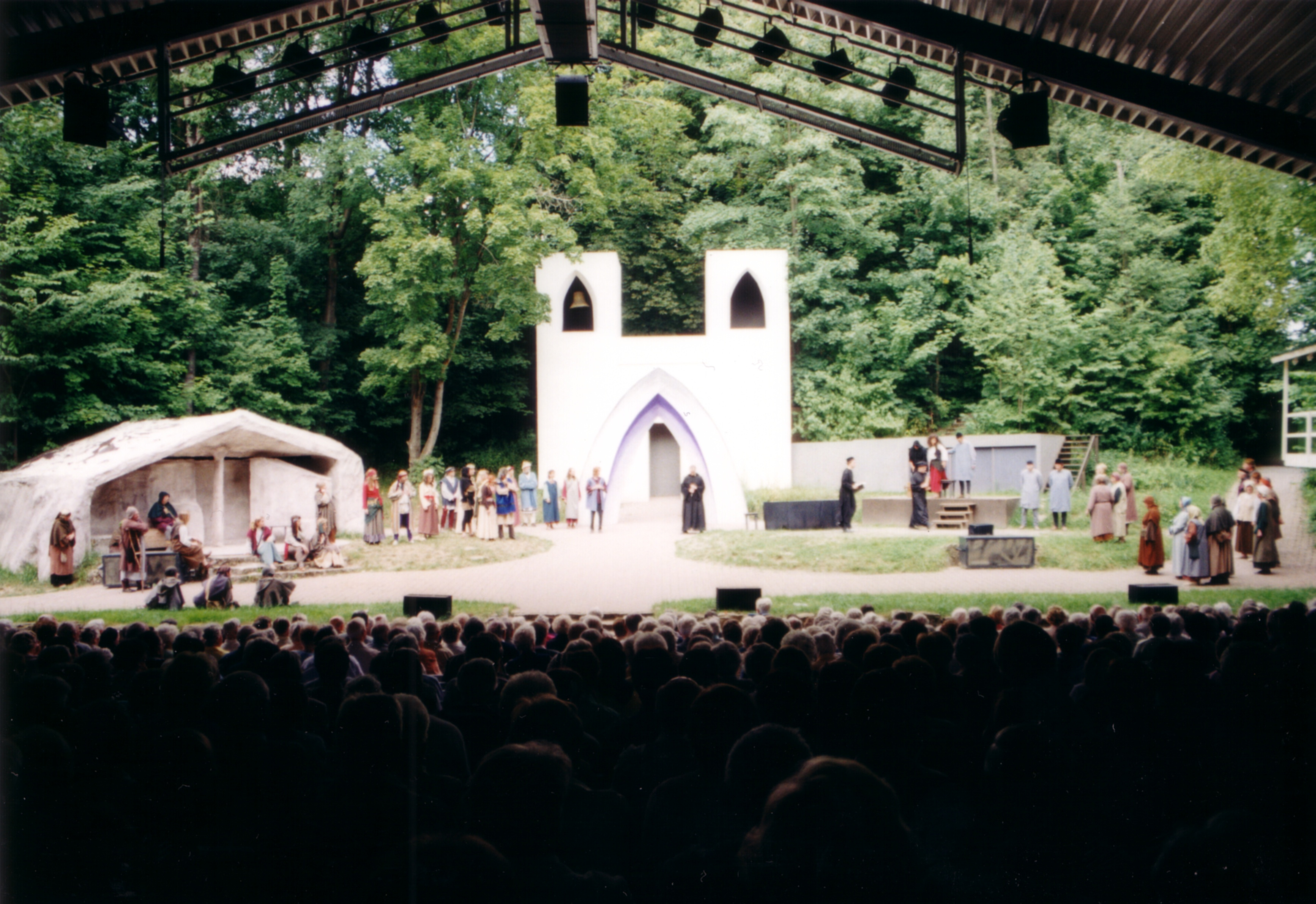 Bühnenbild 2003 - Der Glöckner von Notre Dame